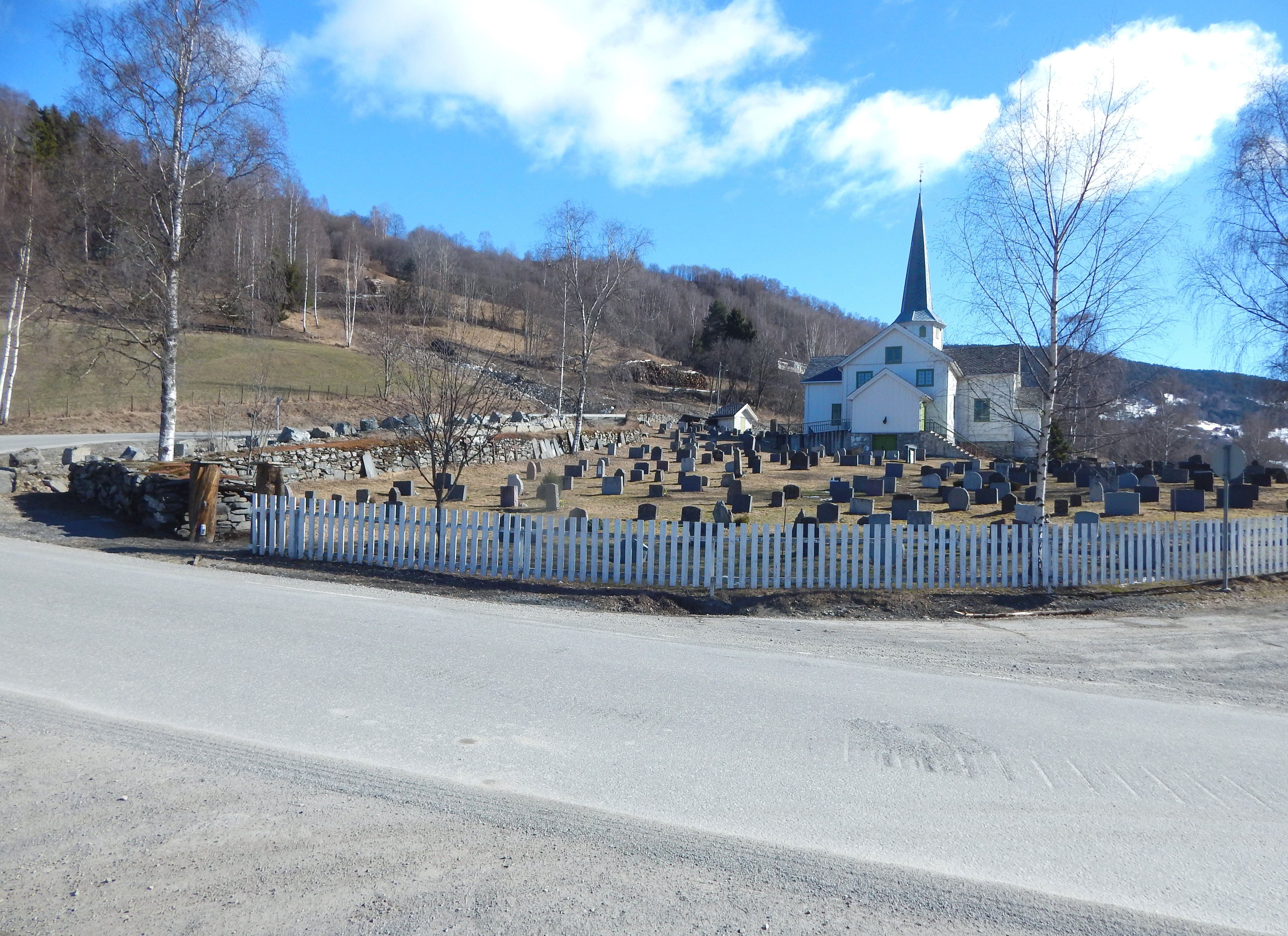 Midtbygdsvegen (fylkesvei 361) ved Øyer kirke